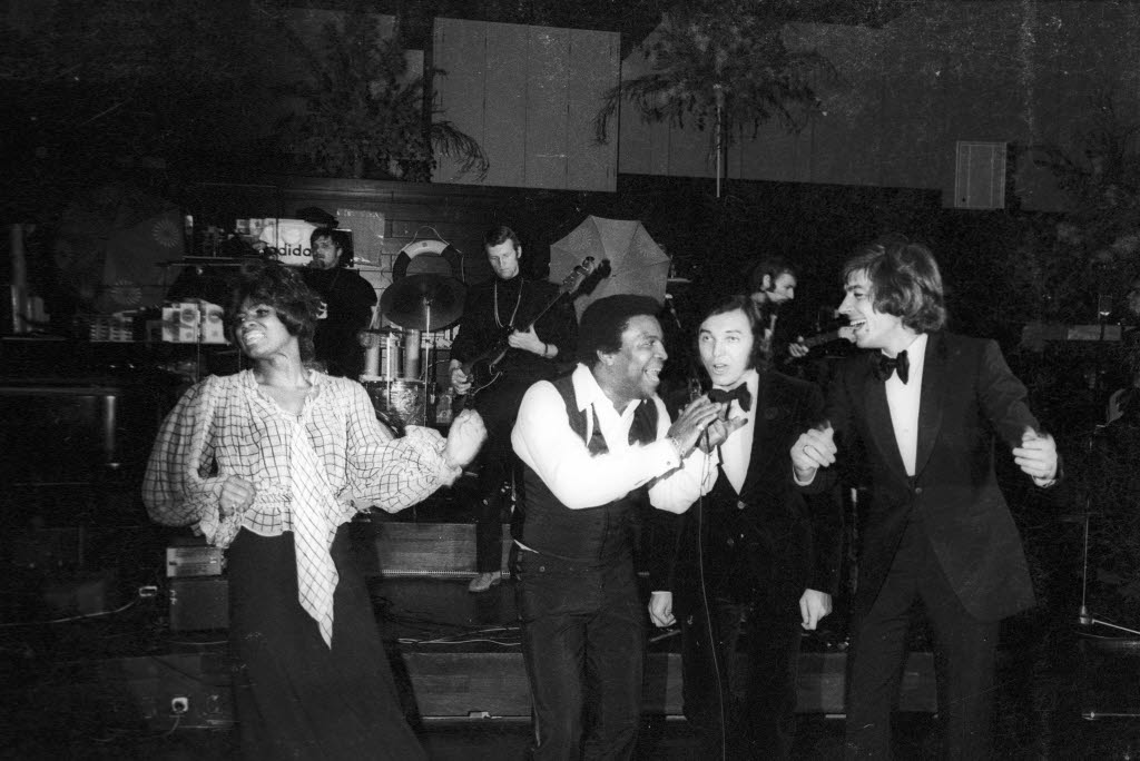 Staraufgebot auf der Bühne. V.l. Marcia, Roberto Blanco, Karel Gott und Bata Illic, begleitet von der Star-Combo, bestreiten das Finale.